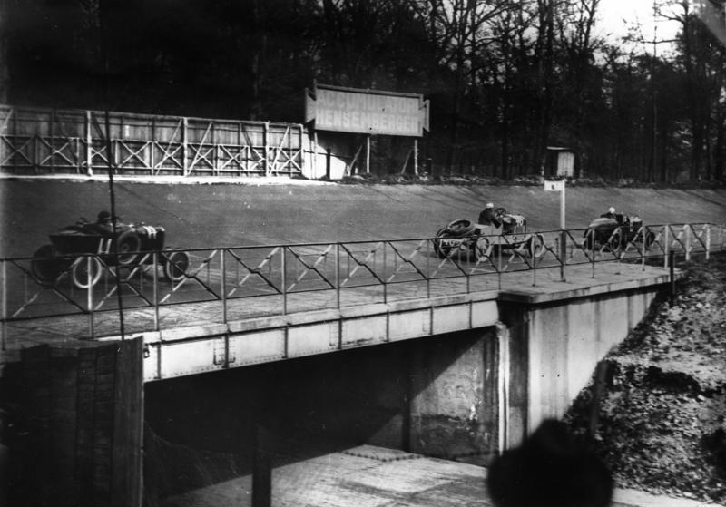 Monza / Mailand. Trainingsfahren um den Preis "Rund um Mailand" auf der grossen Automobilstraße in Monza. Die italienische Automobil-Industrie ist gegenwärtig in grossem Training um den Preis "Rund um Mailand". Unterwegs im Training beim Passieren eines Brückenüberganges. Information added by Wikimedia users.*